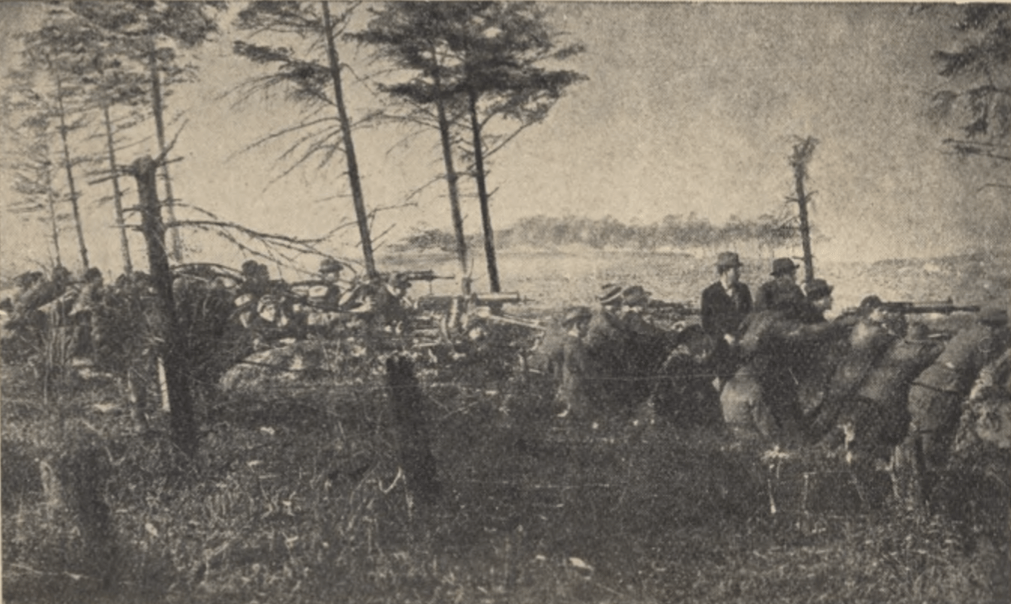 I Powstanie śląskie Kazimierz Świętochowski.